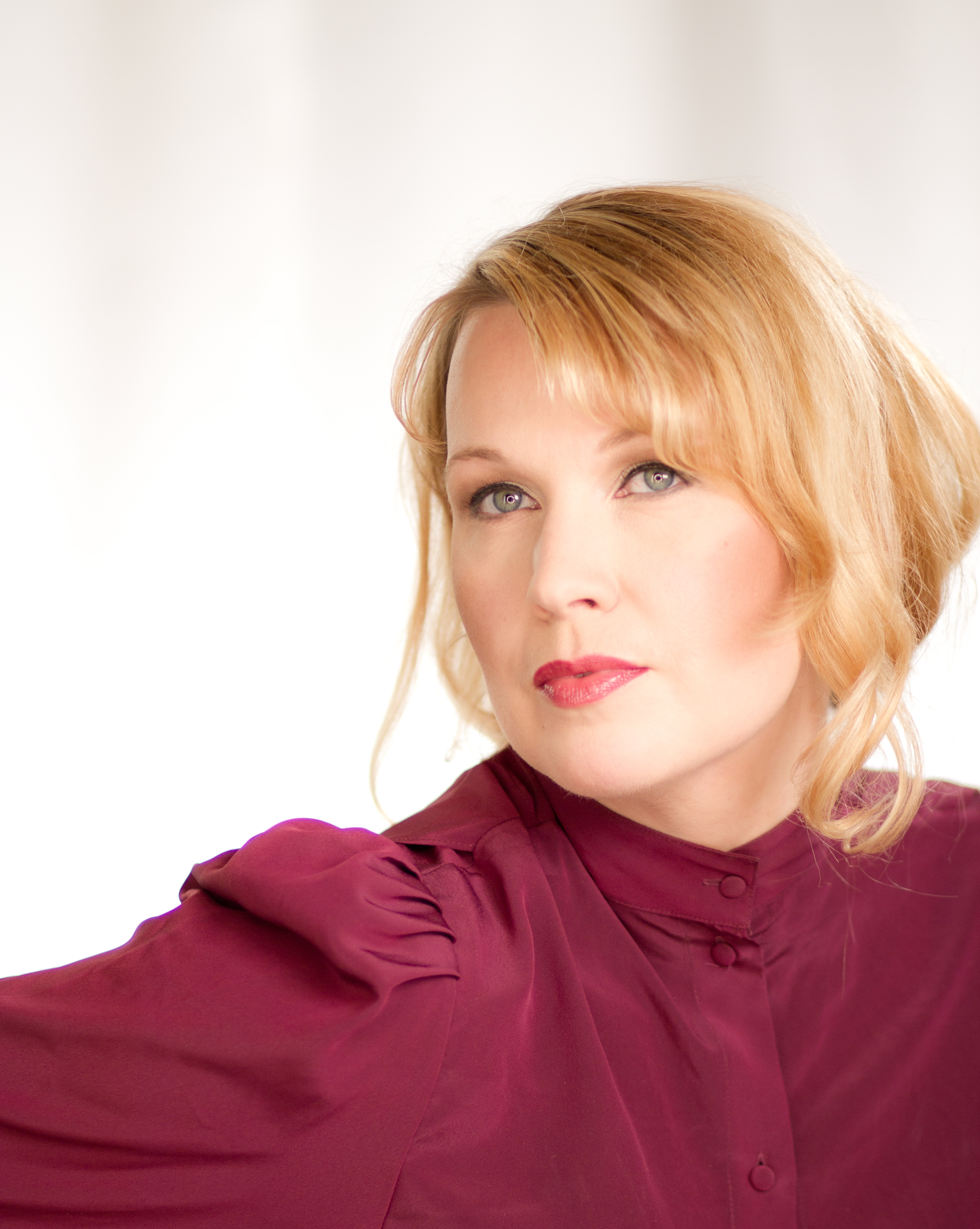 Heidi Puurula